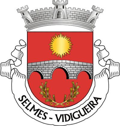 Brasão da Freguesia de Selmes